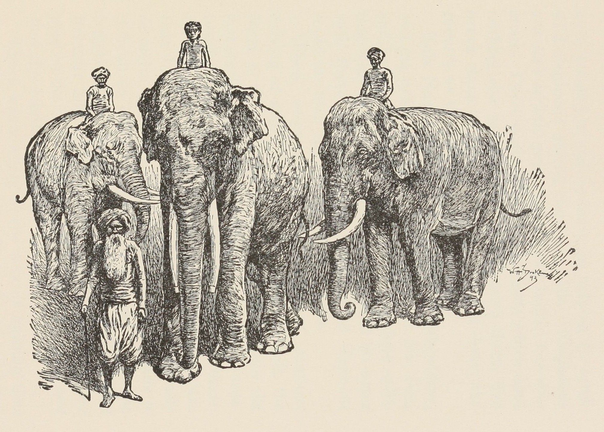 Illustration